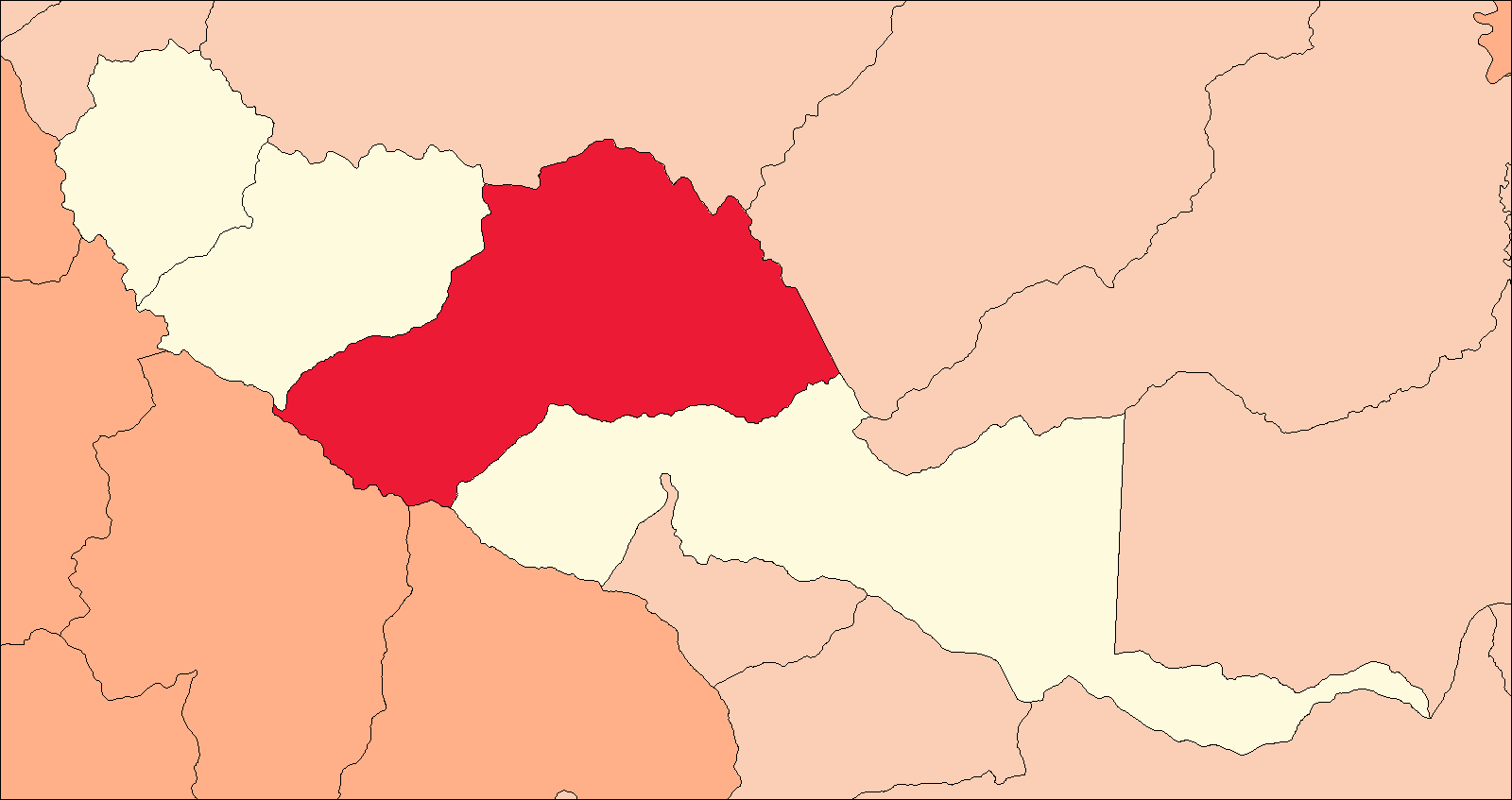 Área del distrito de Huacaybamba.